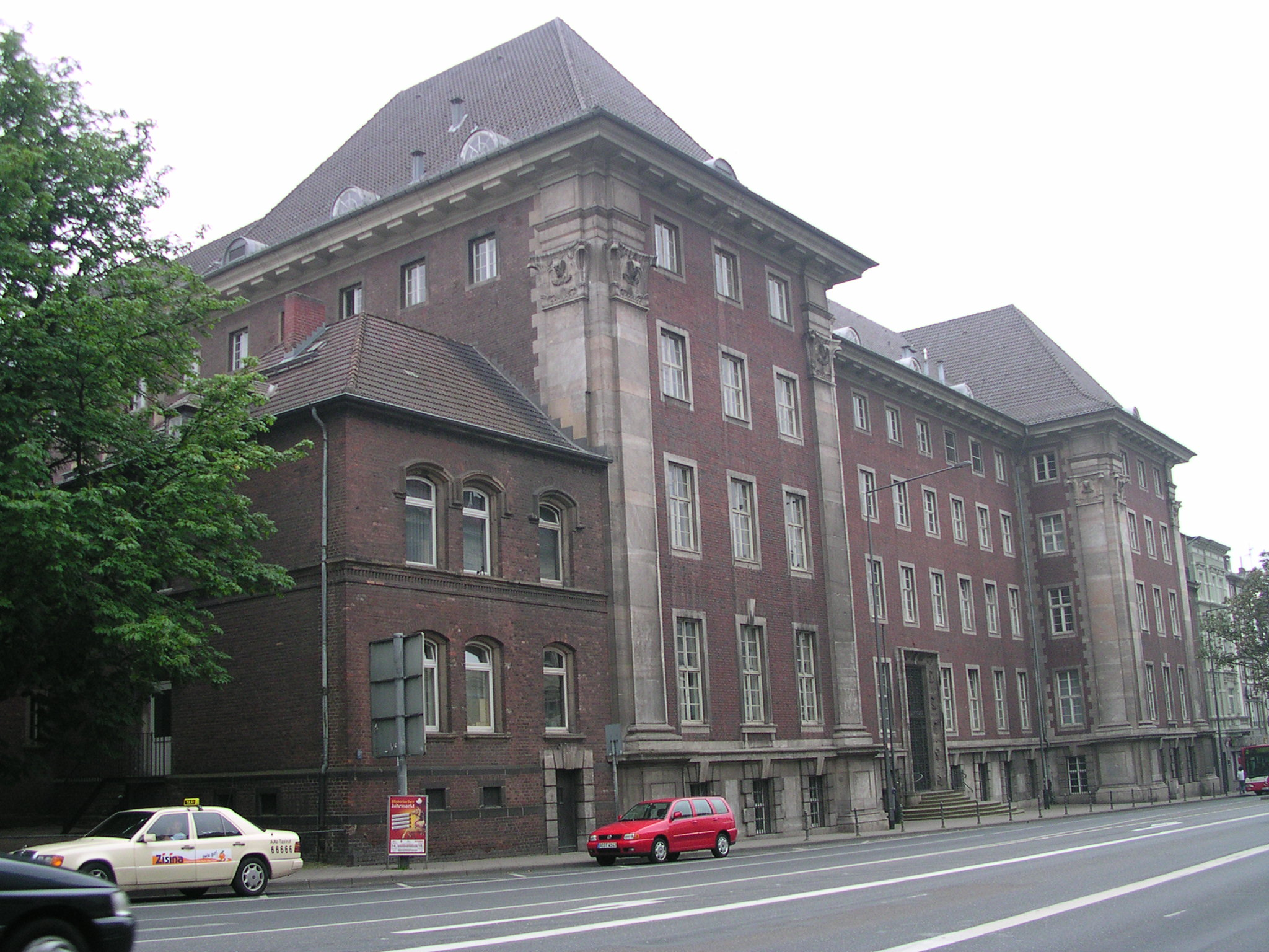 Aachen, Landgericht Nordfront (zum Adalbertsteinweg) in Aachen, Nordrhein-Westfalen, Deutschland.